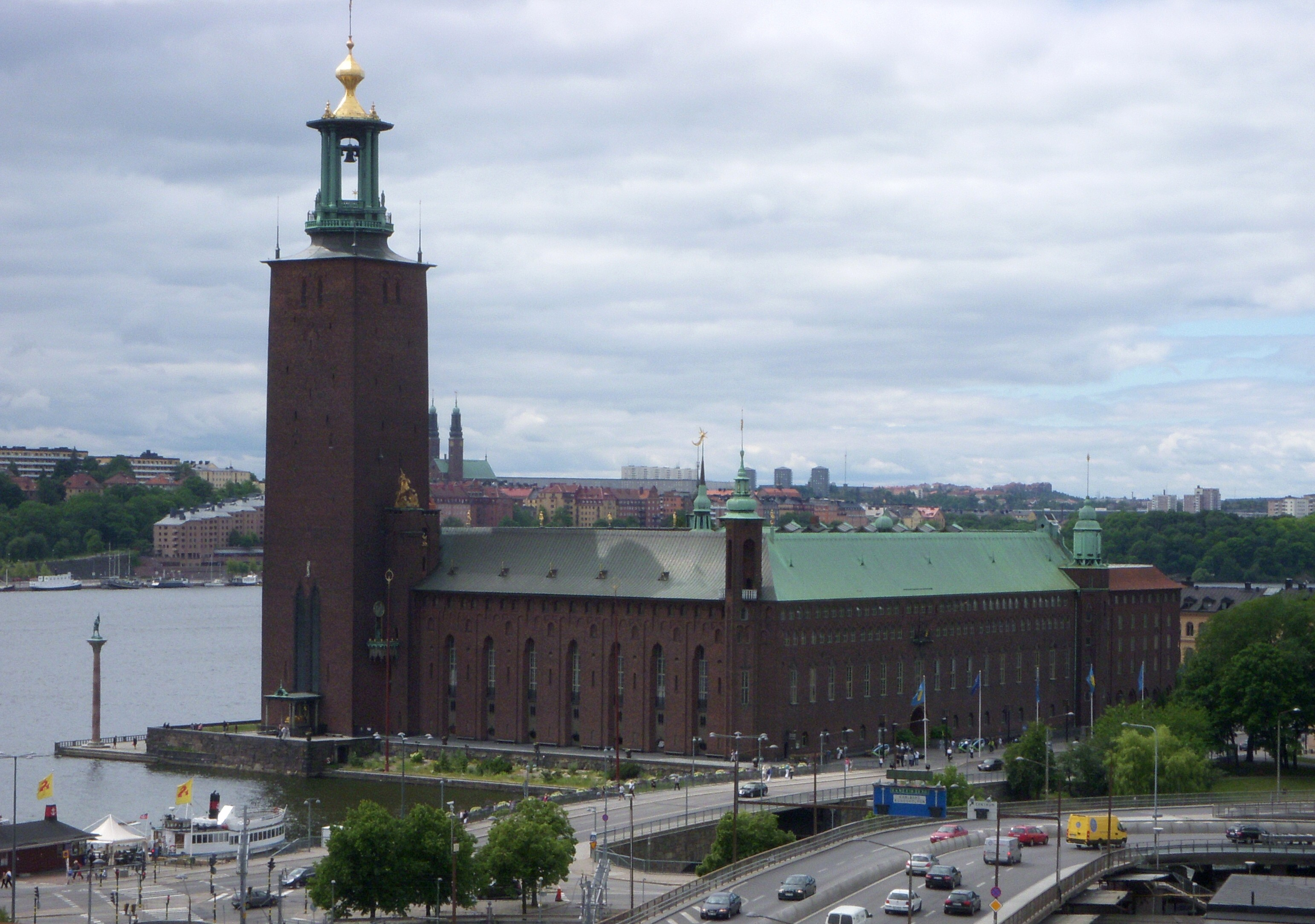 Stockholms stadshus sett från Esslete-husets tak (vid Vasagatan)